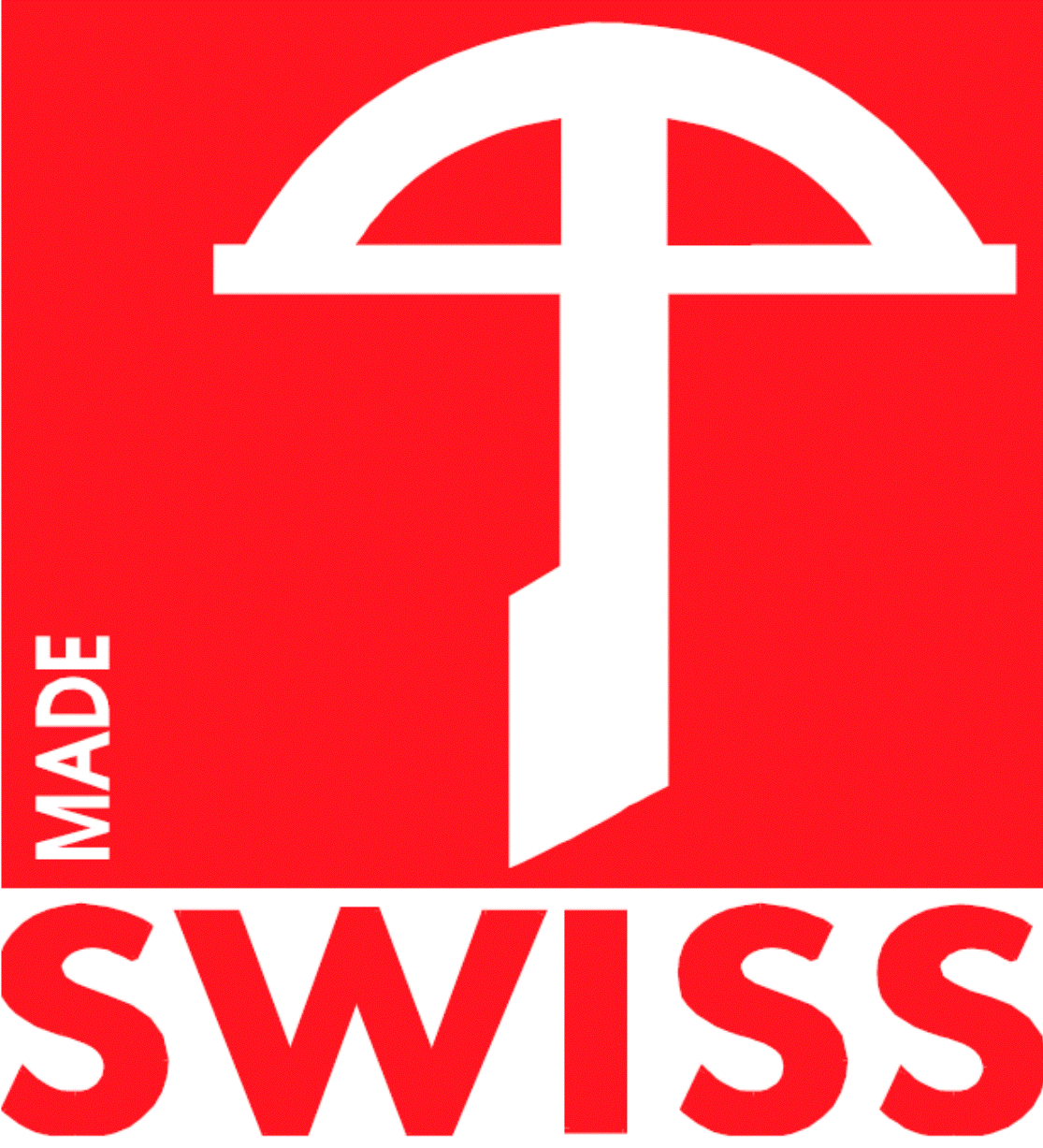 Markenzeichen Armbrust von SWISS LABEL, Gesellschaft zur Promotion von Schweizer Produkten und Dienstleistungen